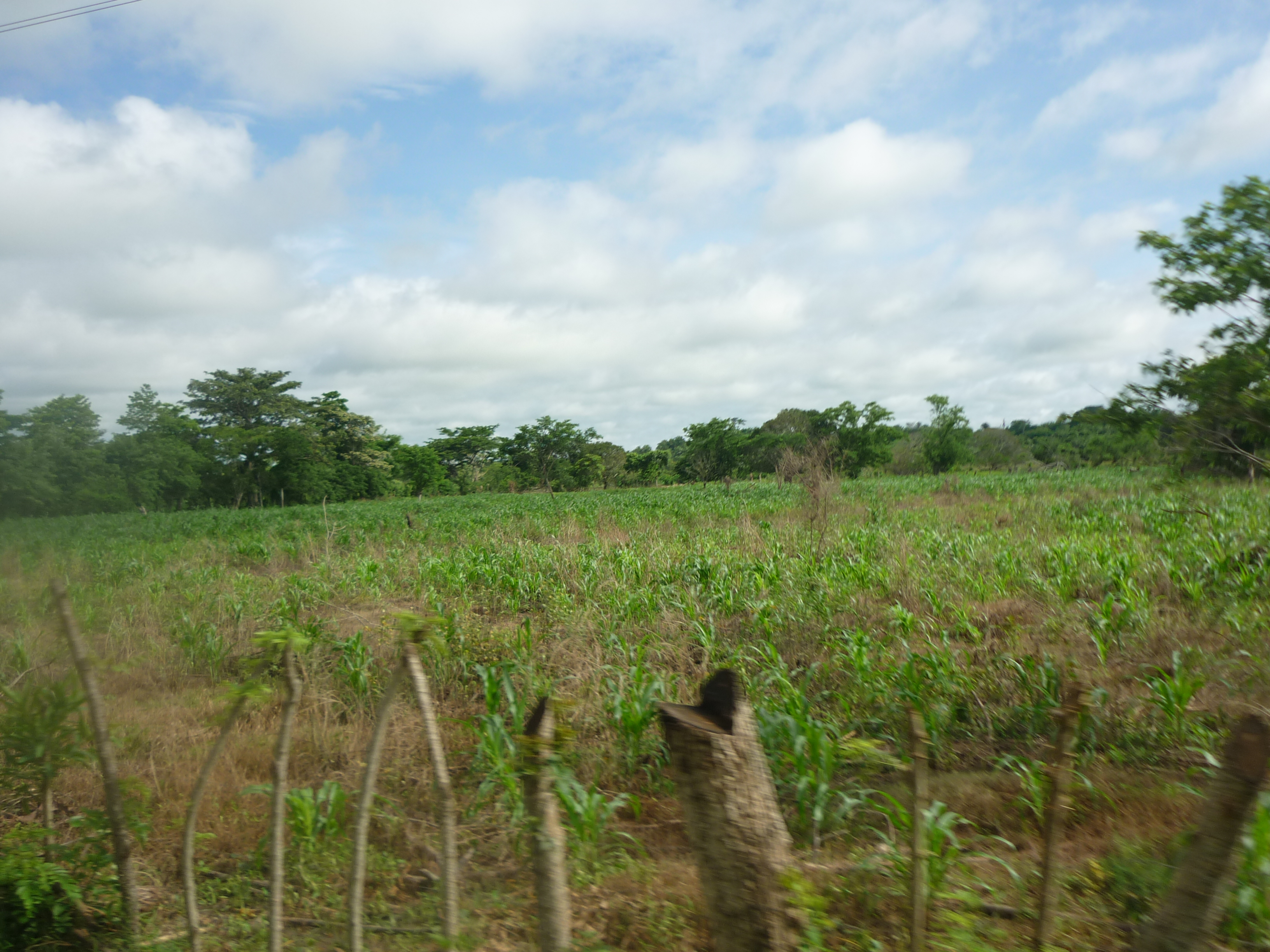 Hatillo de Loba, Sur Bolivar